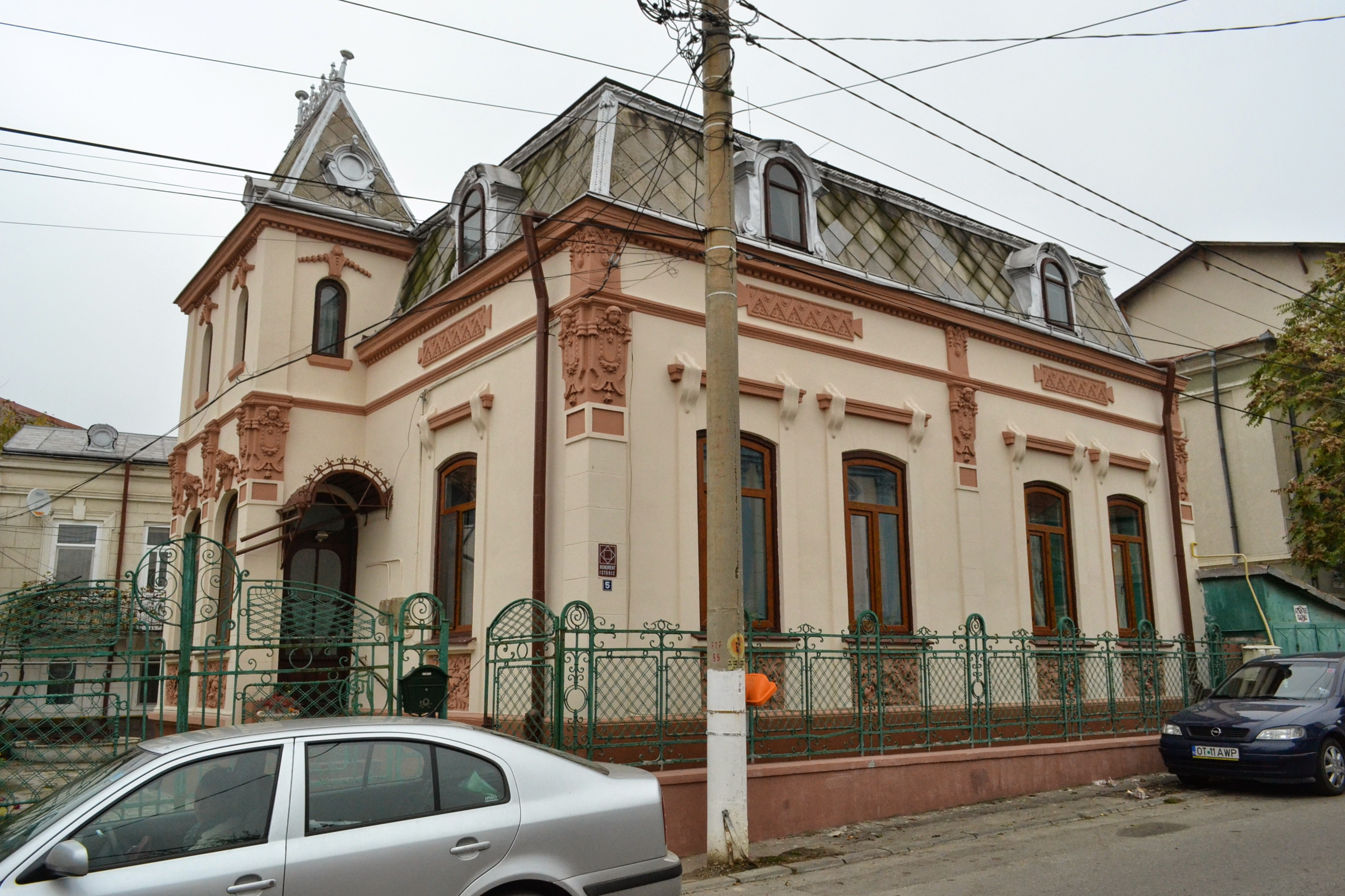 Horia 5 Slatine, lateral